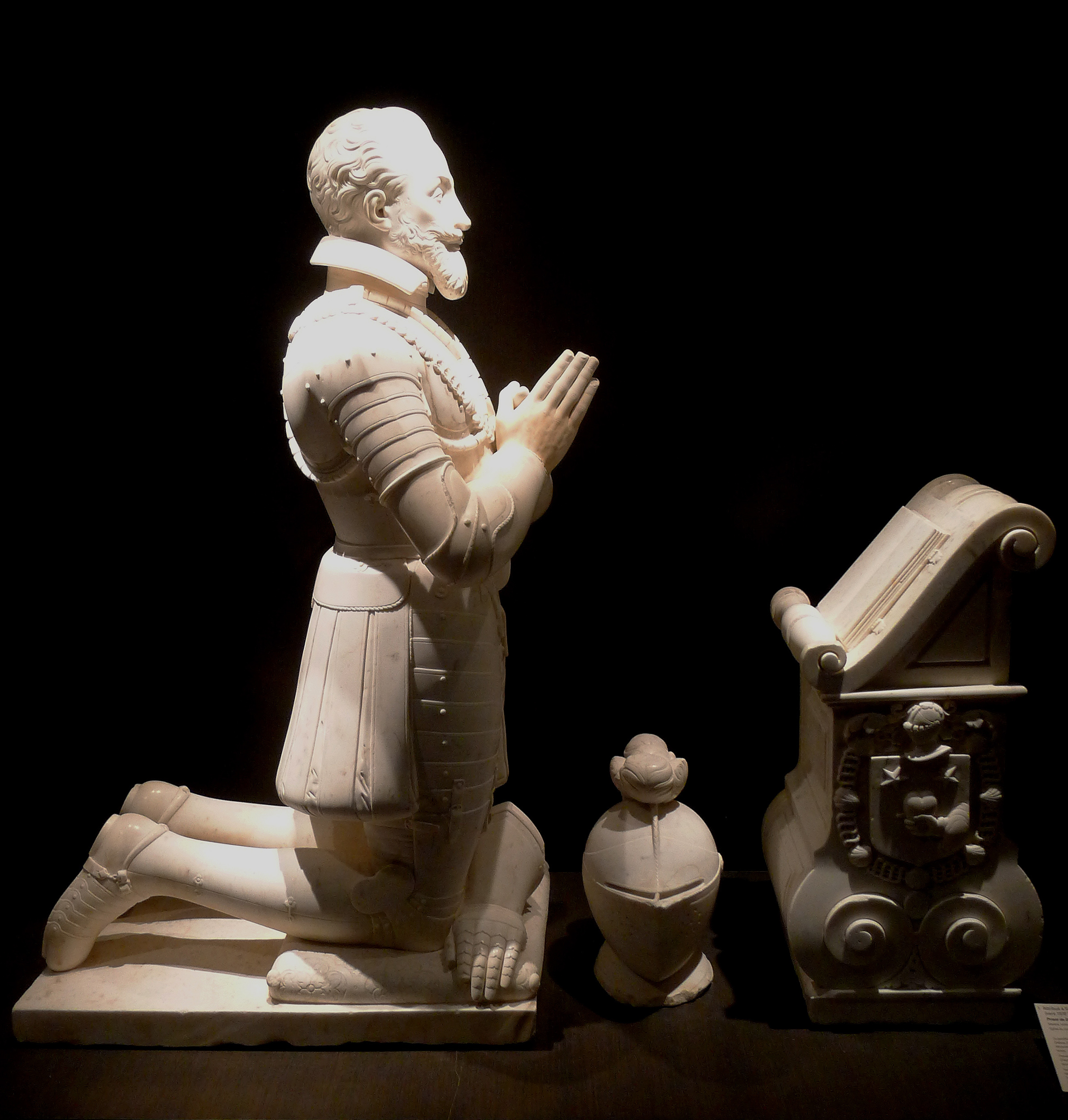 "Priant de Donadieu de Puycharic", attribué à Gervais Delabarre Marbre, entre 1607 et 1613 Initialement dans l'église du couvent des Jacobins, exposée aujourd'hui au musée des Beaux-Arts d'Angers. N° inventaire : 001-138-1